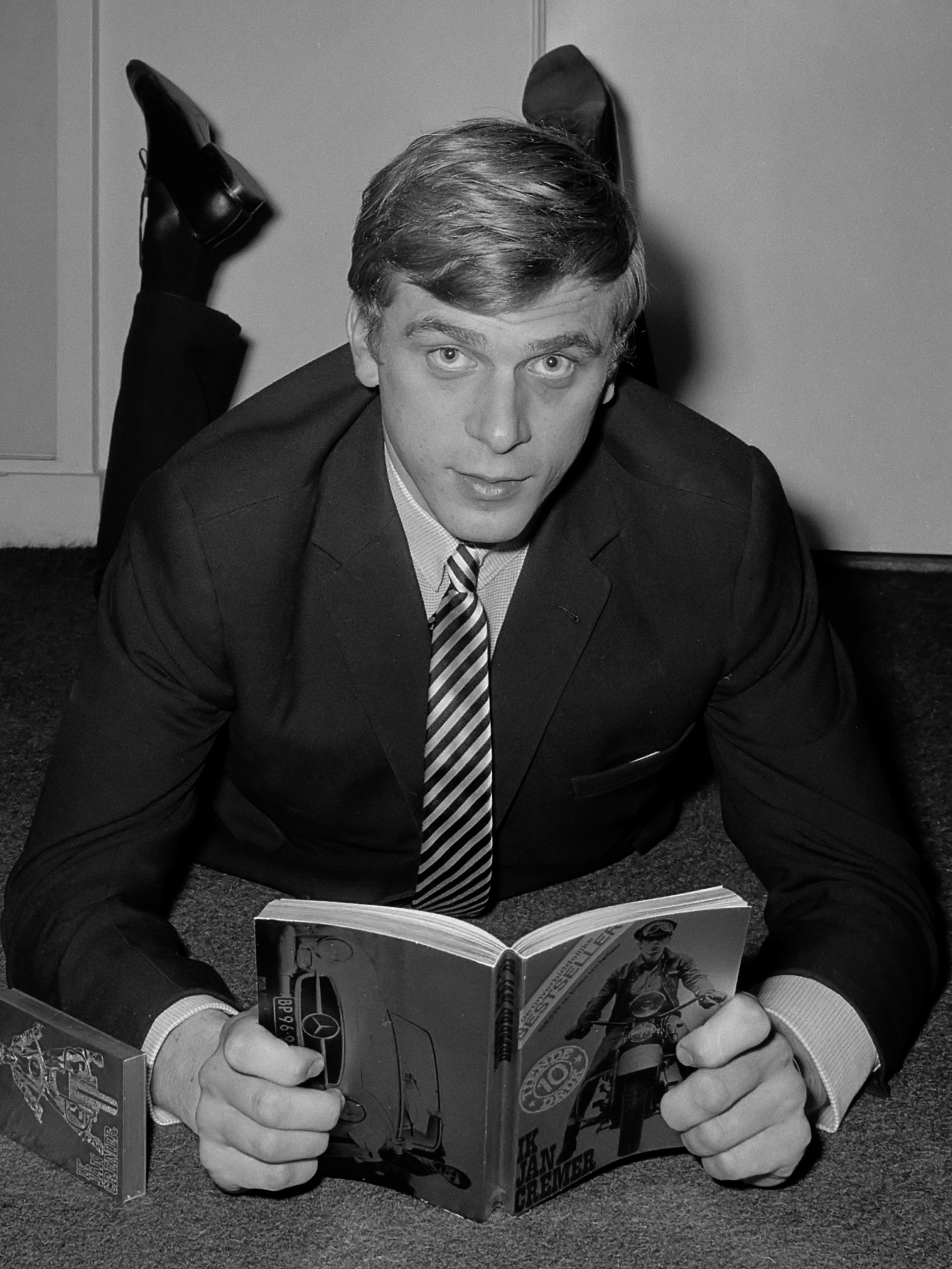 Gouden boek voor Jan Cremer, Jan Cremer met zijn boek op de grond 27 november 1964